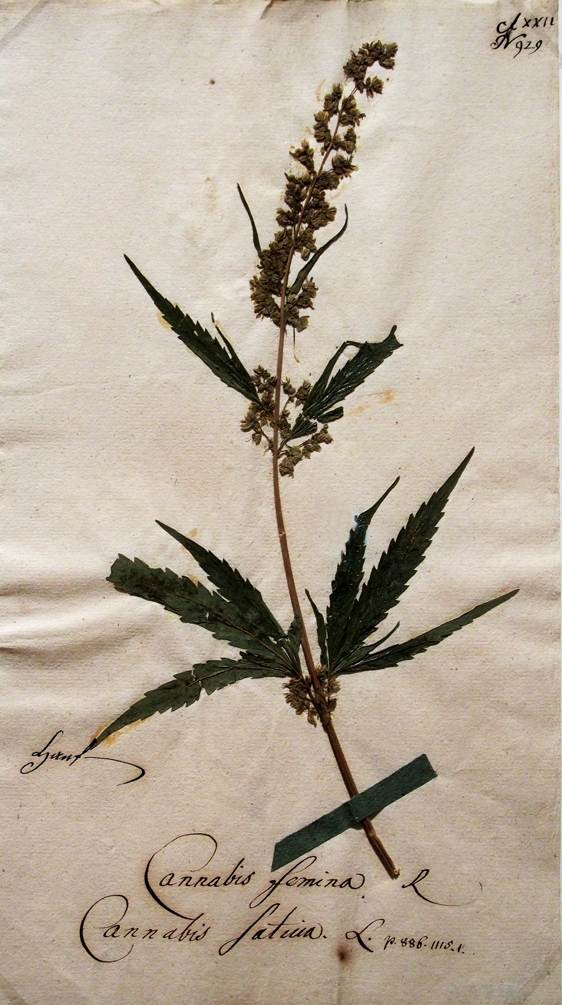 Hanf Cannabis femina - aus Goethes Sammlung botanischer Objekte